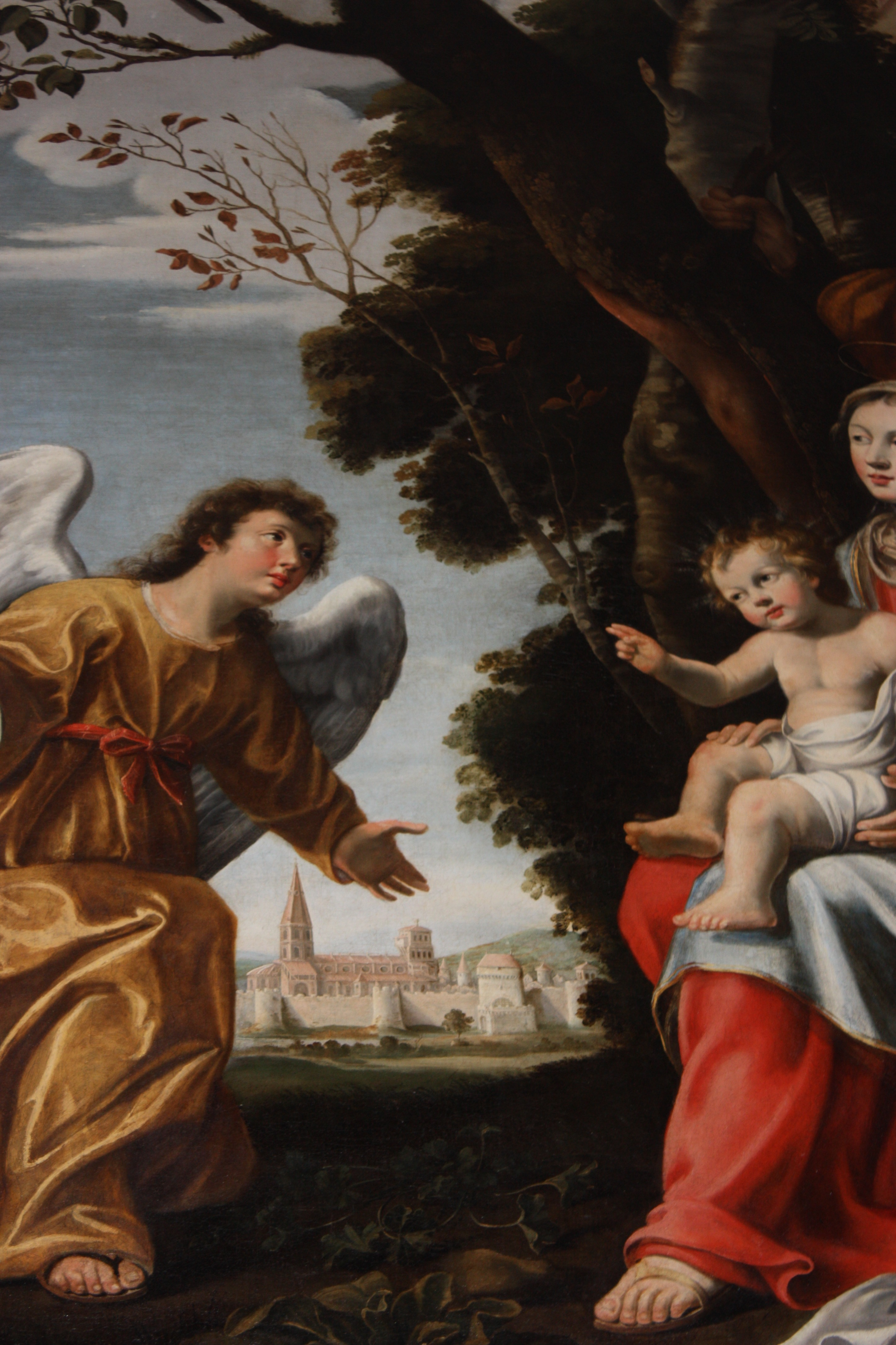 Tableau représentant Brioude au XVIIe s.